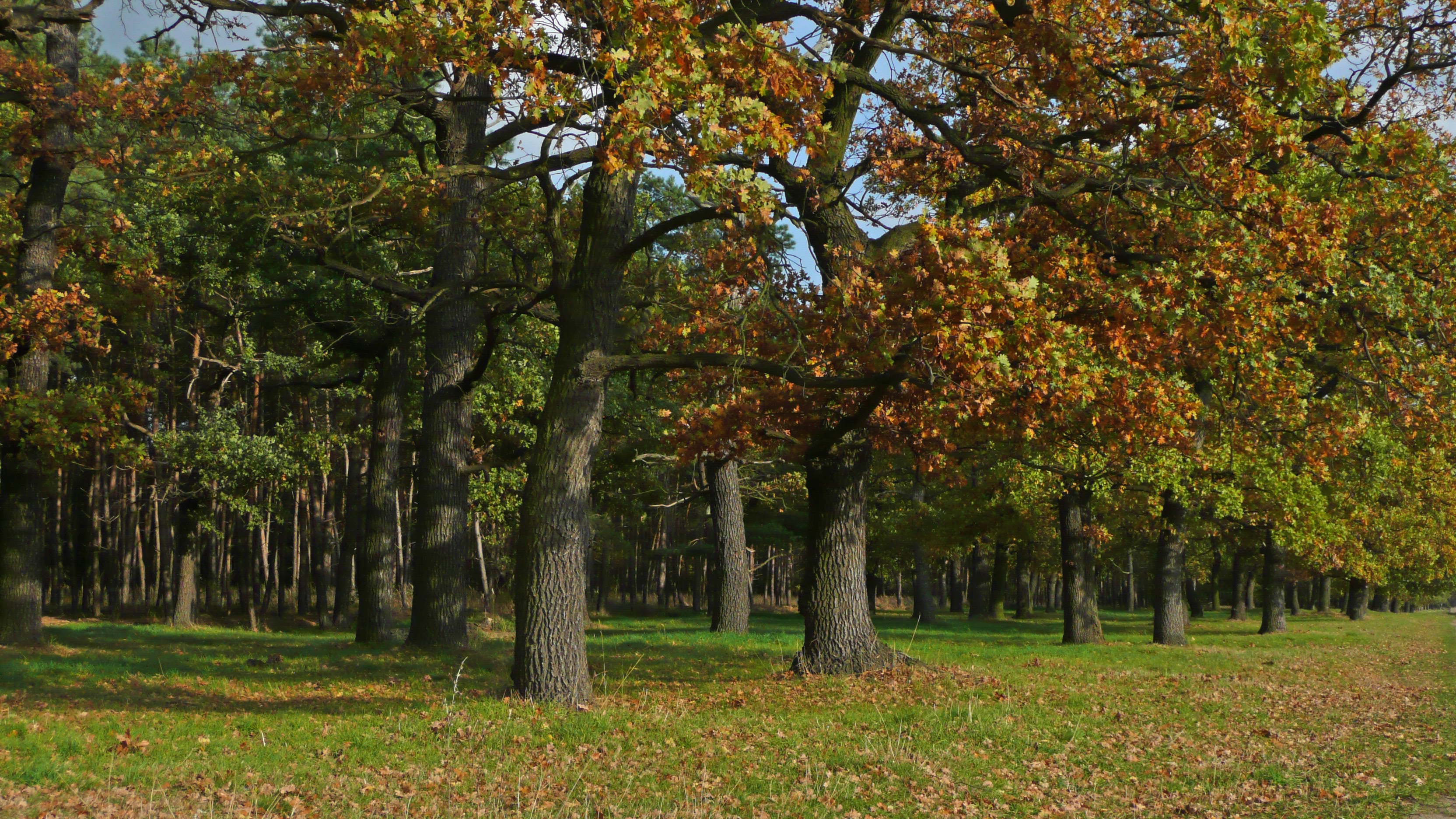 NSG Diebziger Busch: Eichenbäume am Rande des Diebziger Busches